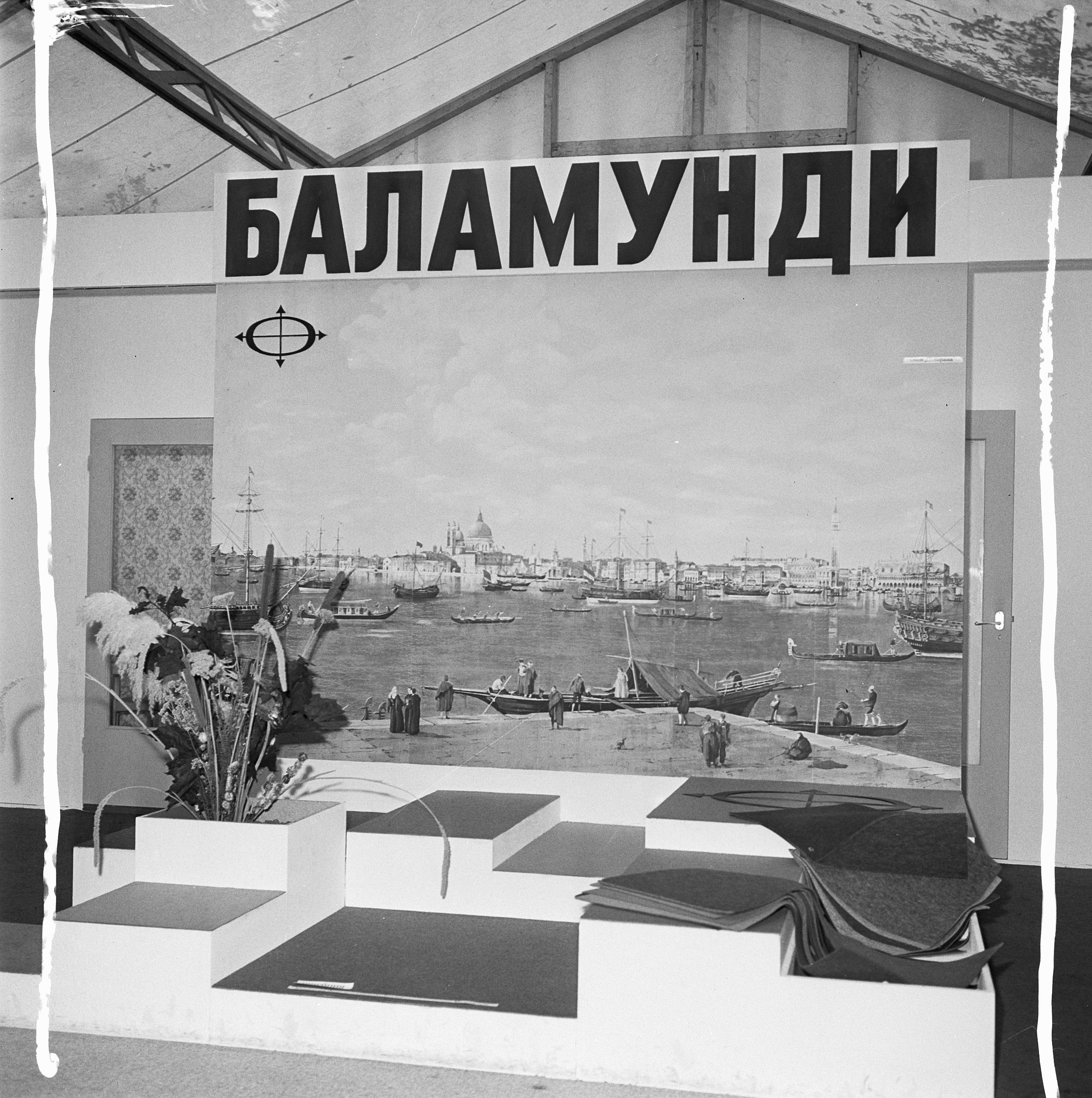 Collectie / Archief : Fotocollectie Anefo Reportage / Serie : [ onbekend ] Beschrijving : Opdracht Balamundi; tentoonstelling Chemistry 70 in Moskou 10 september 1970 Datum : 18 oktober 1970 Locatie : Moskou Trefwoorden : tentoonstellingen Persoonsnaam : Balamundi, Chemistry Fotograaf : TASS / Opdracht Anefo Auteursrechthebbende : Nationaal Archief Materiaalsoort : Negatief (zwart/wit) Nummer archiefinventaris : bekijk toegang 2.24.01.03 Bestanddeelnummer : 923-9347